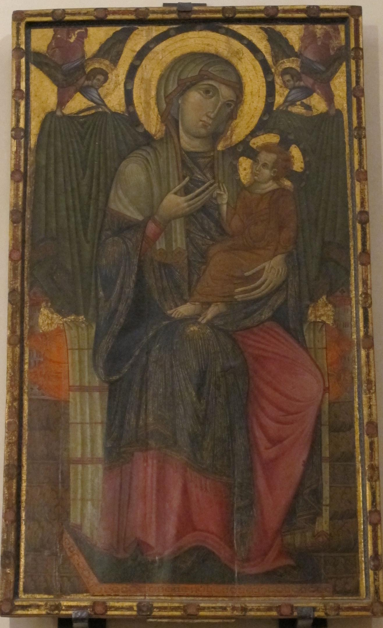 Assisi, santa chiara, interno, maestro di santa chiara, maestà